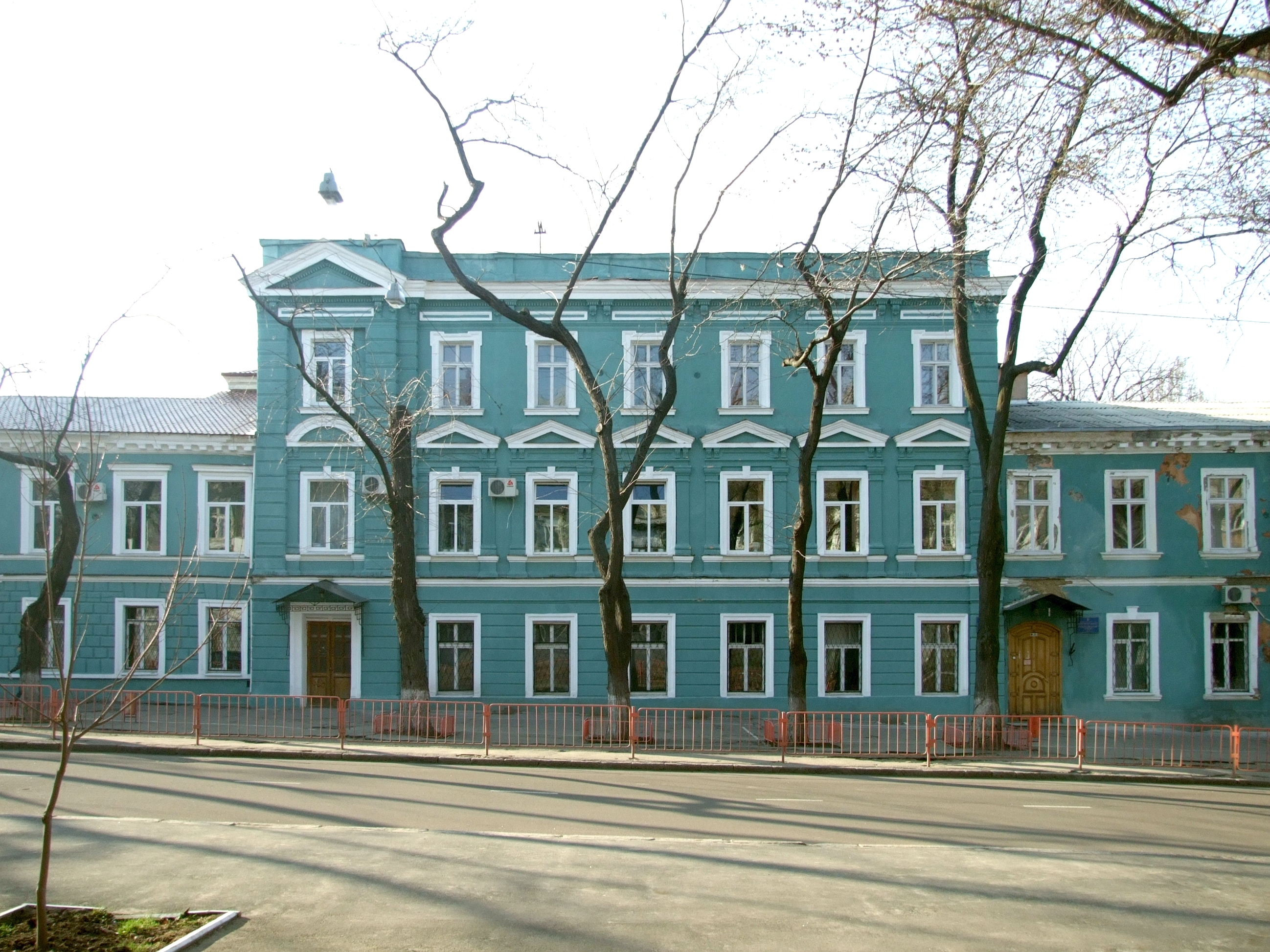 Будинок житловий Сафонова,в якому жив В.Ф. Алоіз - чеський композитор і віолончеліст